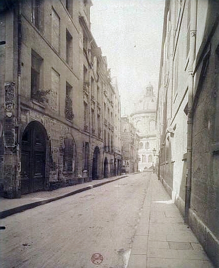 Rue Mazarine, Paris, photographiée par Eugène Atget (1857-1927). Photographie positive sur papier albuminé d'après négatif sur verre au gélatinobromure. N° Atget : 4637. 1902.